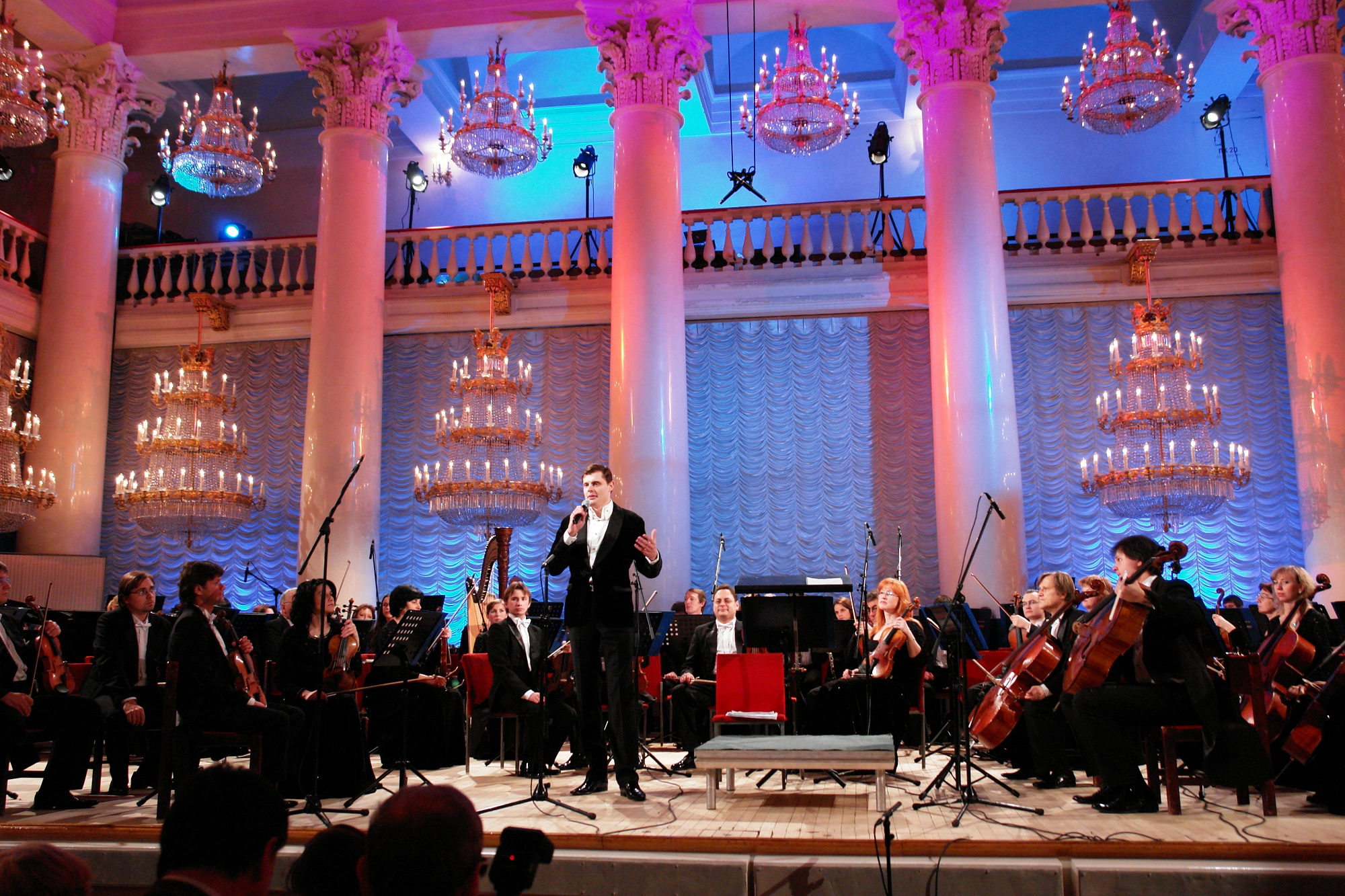 Колонный зал Дома Союзов. Концерт в честь Е. Образцовой, ведущий - Е. Н. Понасенков.